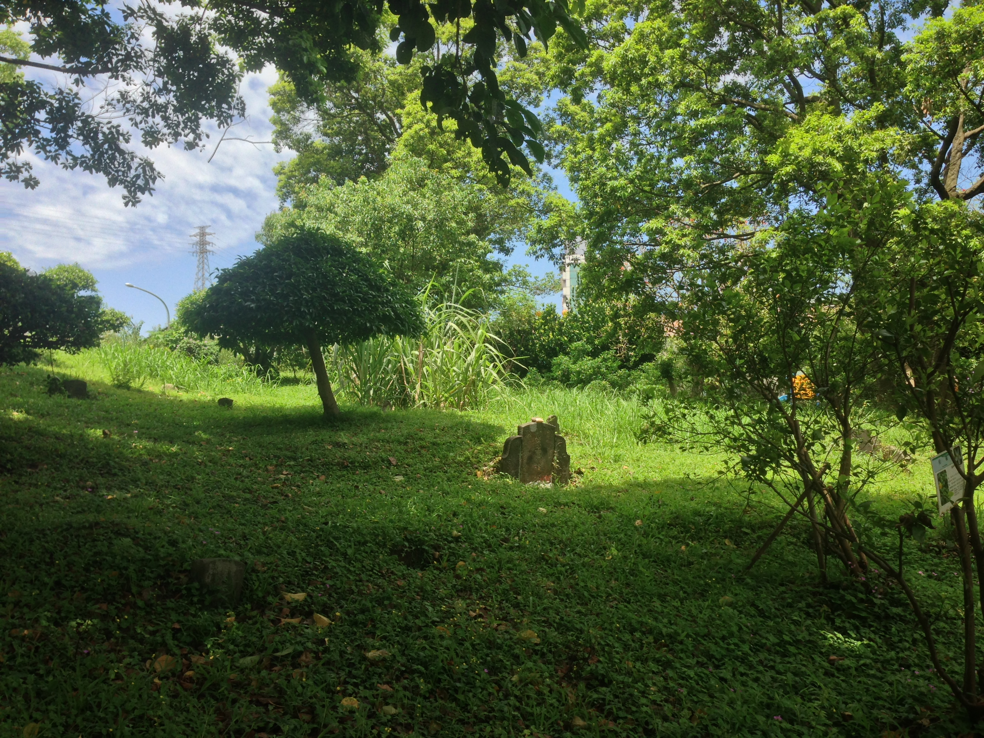 中文（台灣）: 擺接義塚大墓公古墓